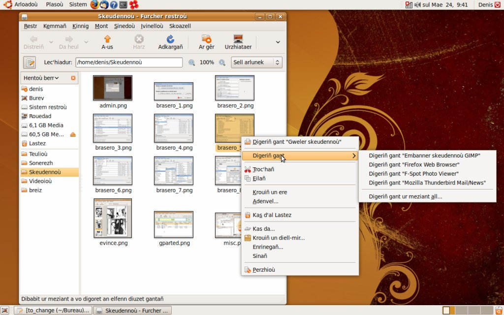 Pakad skrammad Ubuntu Jaunty Jackalope